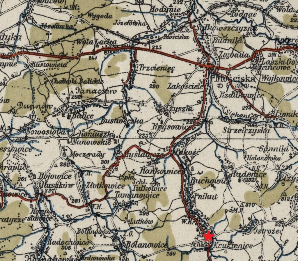 мапа крукенич